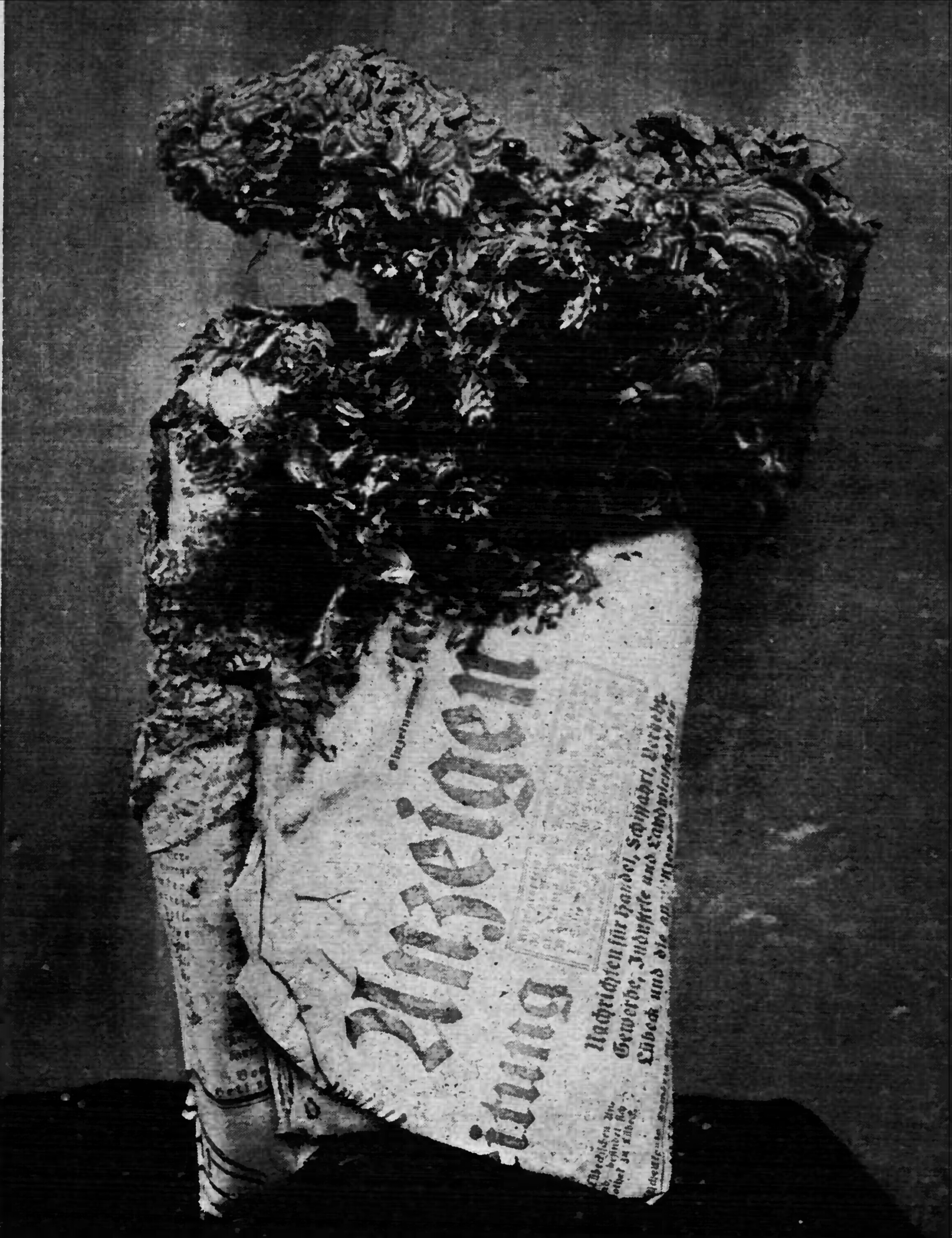 “Es sind die schlechten Früchte nicht, woran die Wespen nagen“. Die überwinternden Weibchen der seinerzeit 9 in Lübeck existierenden Wespenarten, beginnen Ende April mit dem Nestbau unter den Dachrinnen, Bodenluken, … 1933 in einer Zeitung, womit ein Zugloch an einer Dachlucke zugestopft war.